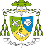 Wappen von Bischof Konrad Zdarsa, Bischof von Görlitz 2007-2010